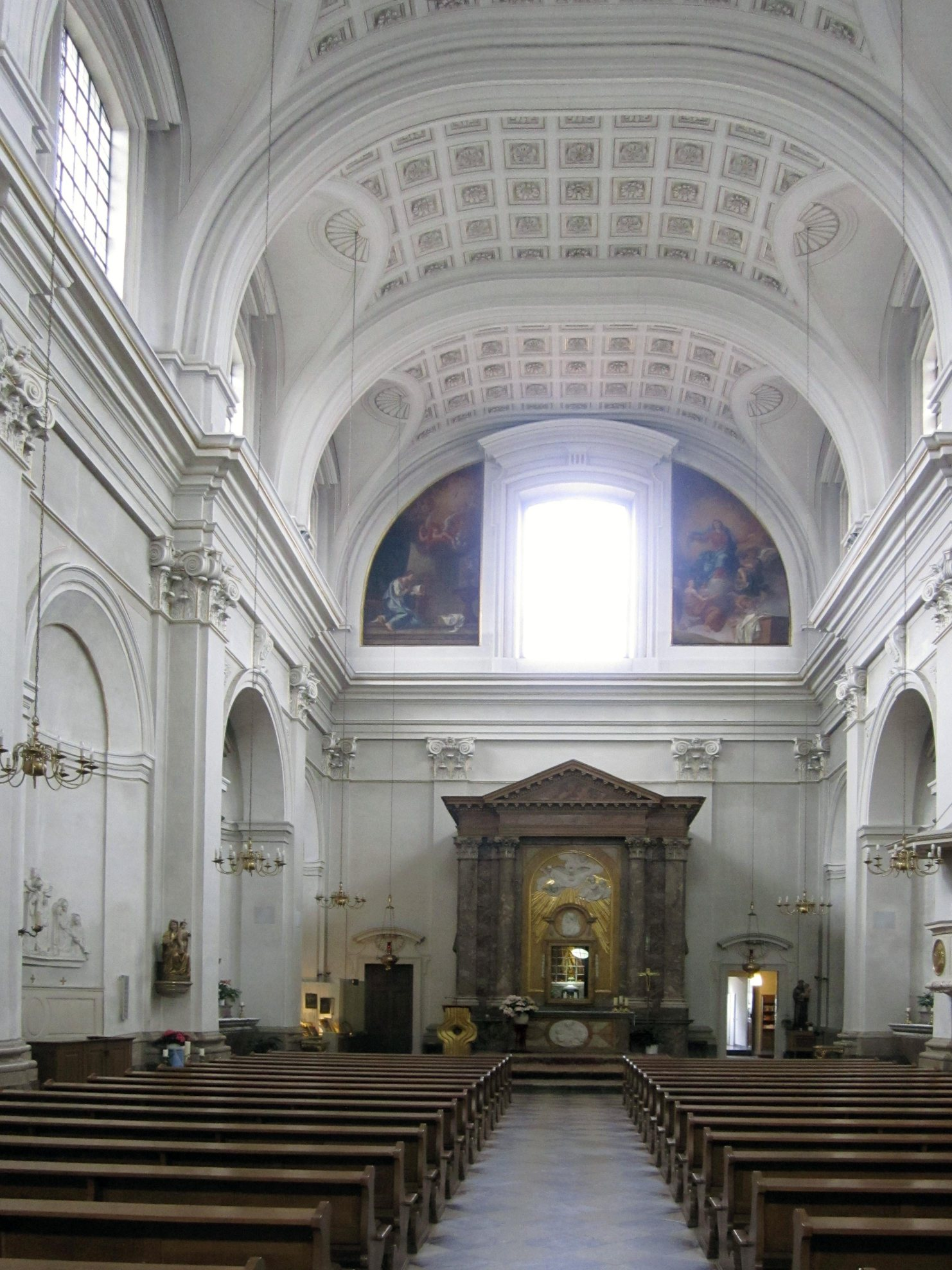 Ludwigshafen-Oggersheim, Mariä Himmelfahrt, Foto: 2014